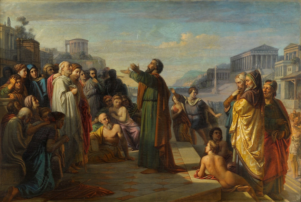 Paulus in Athen. Öl auf Leinwand, 120 x 178 cm